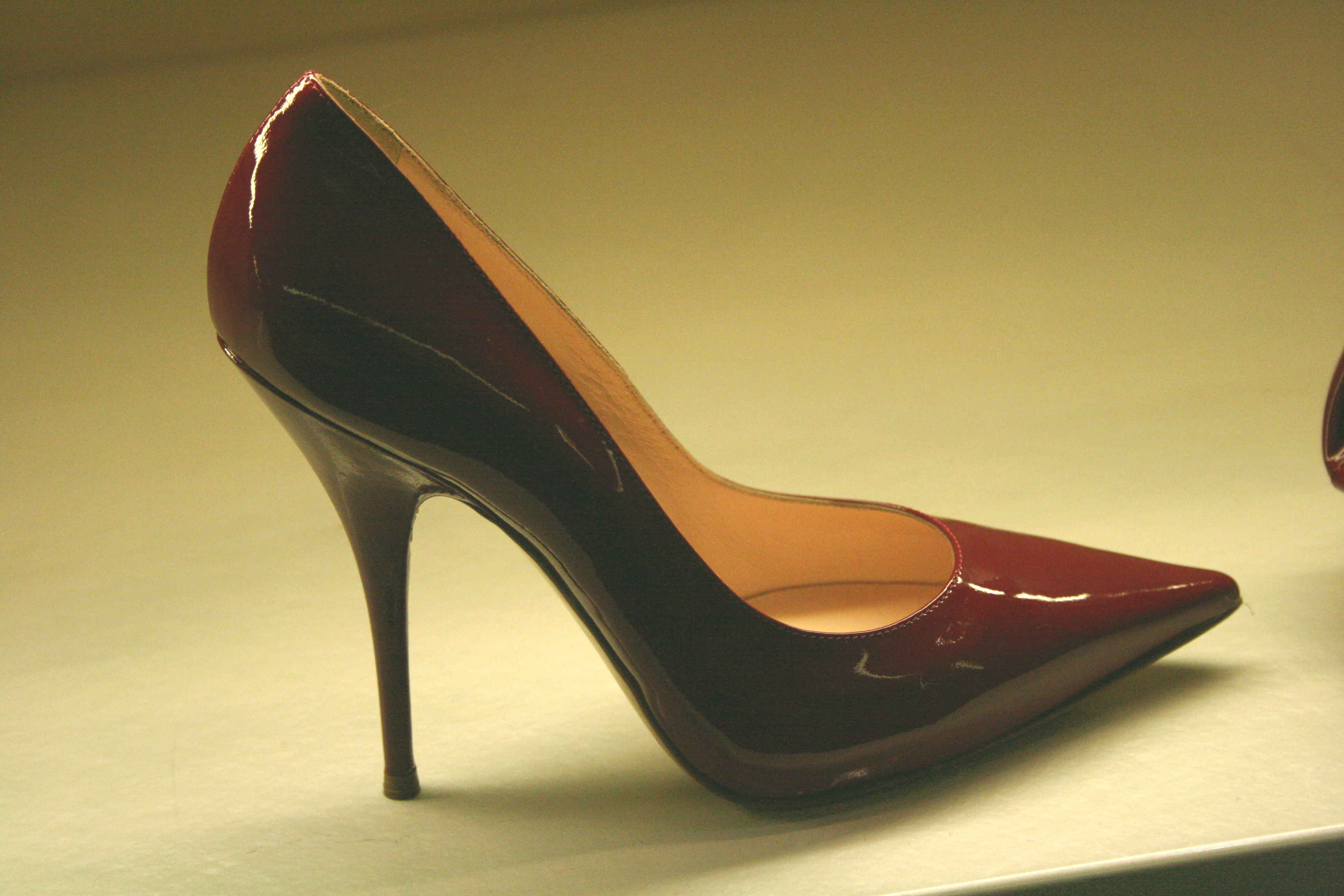 Zapatos de tacón - Zapatos de aguja